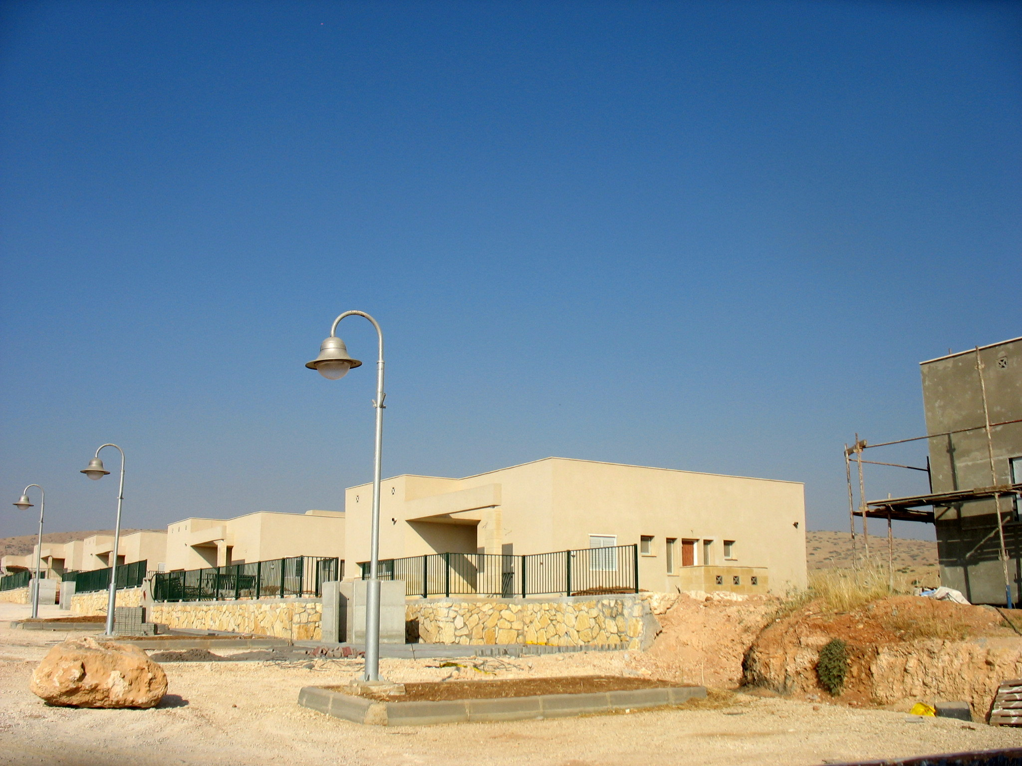 בתי אמנה